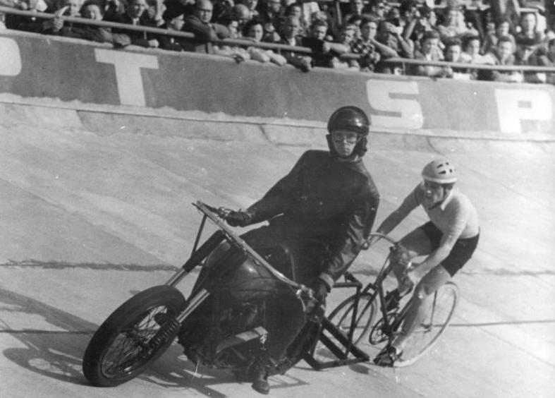 Peter Gröning Zentralbild Kohls 17.8.1958 Me Gröning triumphierte über Weltmeister Begeisternde Steherrennen bei der Weltmeister-Revanche Von 7000 Zuschauern stürmisch umjubelt, absolvierte am 16. August 1958 Peter Gröning (SC Dynamo Berlin) als verdienter Sieger der Berliner Weltmeisterschafts-Revanche der Amateur-Dauerfahrer die Ehrenrunde auf der Radrennbahn Weißensee. In dramatischen Kämpfen brachte Gröning dem vor sieben Tagen in Leipzig gekürten Welt-Titelträger Lothar Meister I die erste Niederlage bei. UBz:Der Sieger Peter Gröning hinter seinem Schrittmacher.